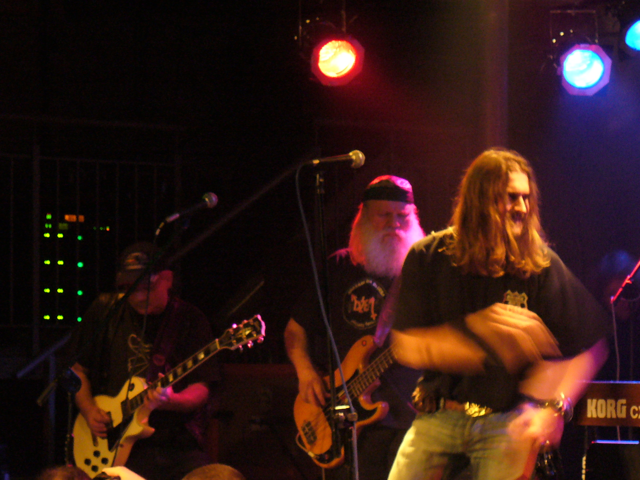 Koncert Dżemu (styczeń 2007 - Katowice) - od lewej - Adam Otręba, Beno Otręba, Maciej Balcar